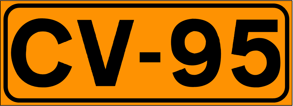 Inidcador de la Carretera de la Comunidad Valenciana CV-95